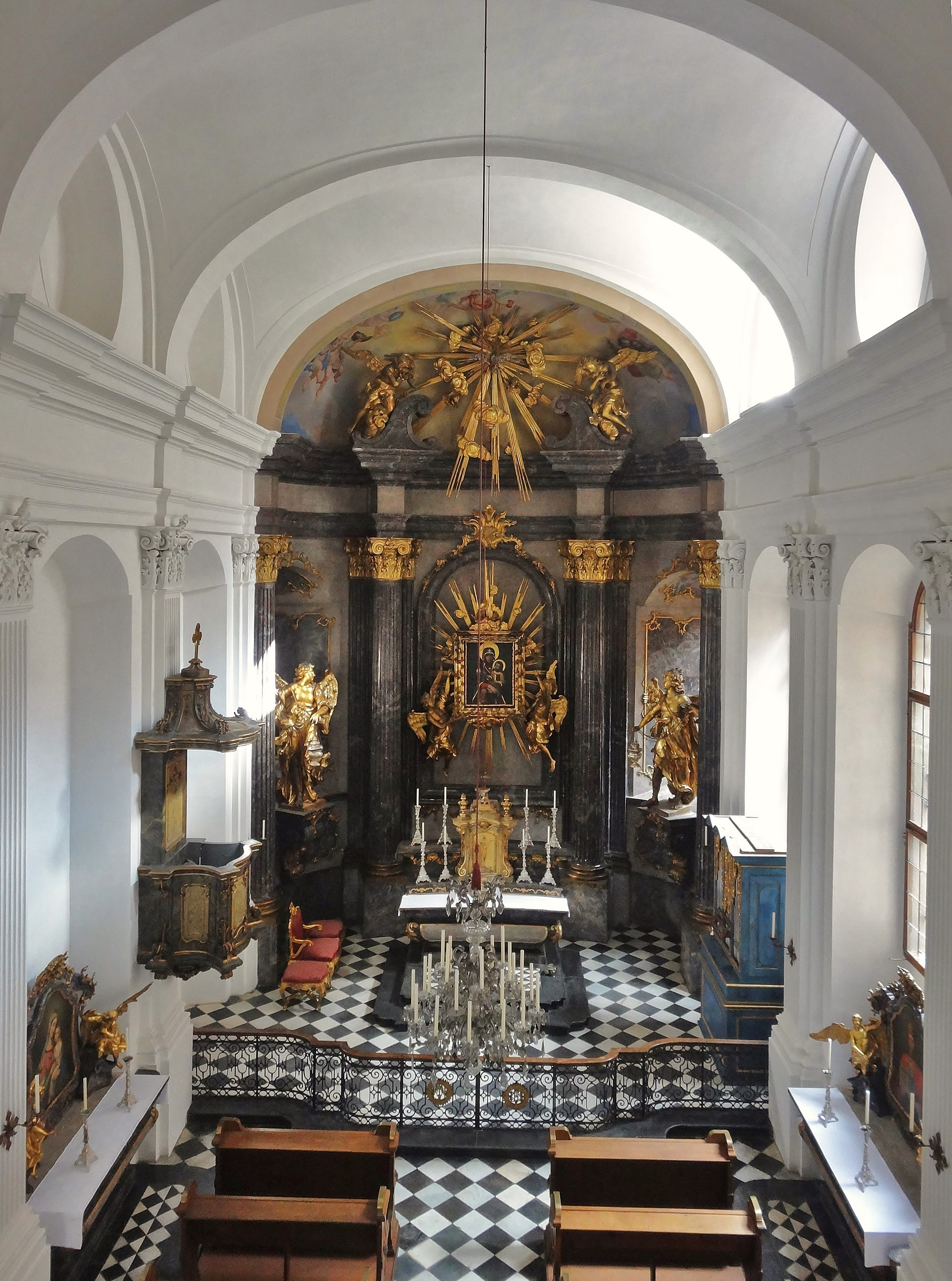 Schloss Eggenberg (Graz), Blick in die Kapelle